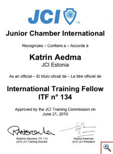 JCI on rahvusvaheline organisatsioon, kus aastakümneid peale väga põhjalikku rahvusvahelisel tasemel parimate koolitajate käe all õppimist ja ülemaailmseid esinemisi, oli võimalik saavutada rahvusvaheline koolituste disainimise ja läbiviimise tase. Katrin Aedma on Eestis ainus ITF taseme koolitaja, maailmas 134-s